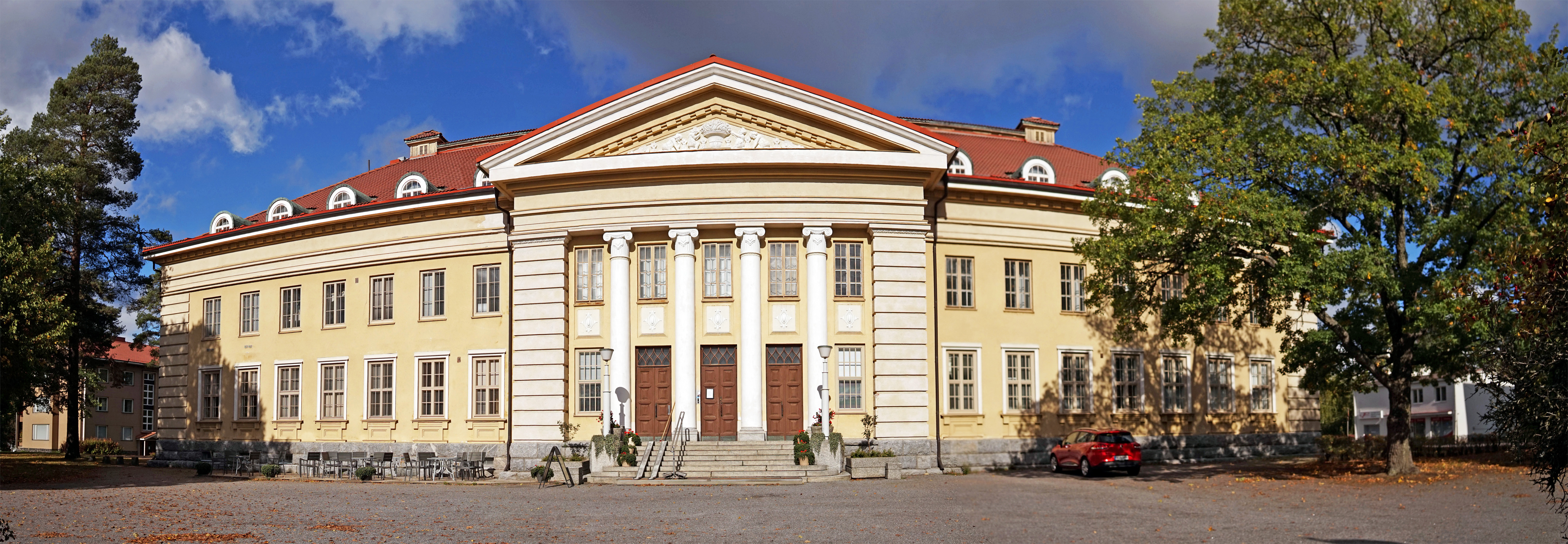 Mäntän klubi.